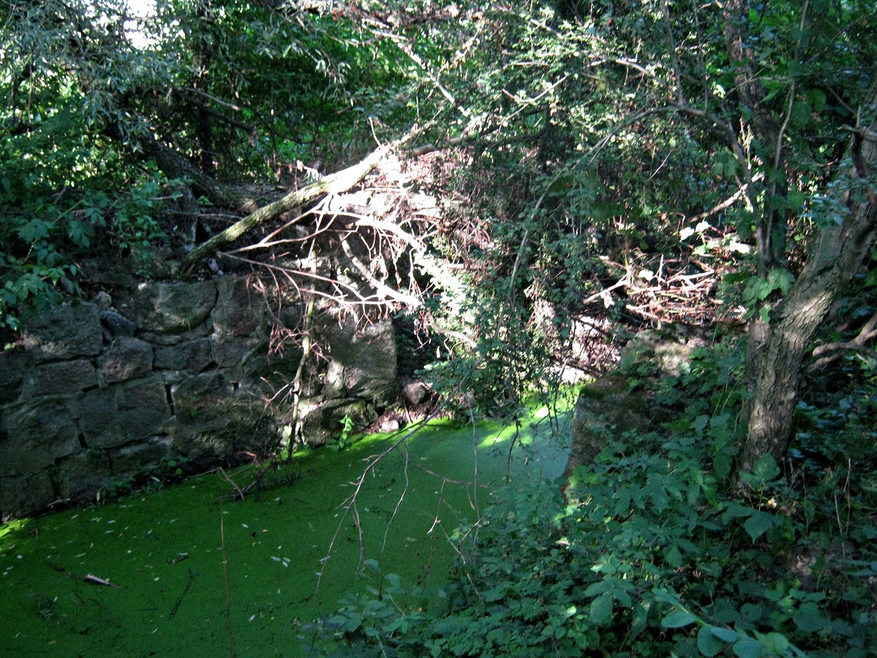 Resztki dawnych przyczółków mostu na Strudze Mierzewskiej w Mierzewie. Tędy przebiegała linia Mierzewo- Stanisławowo